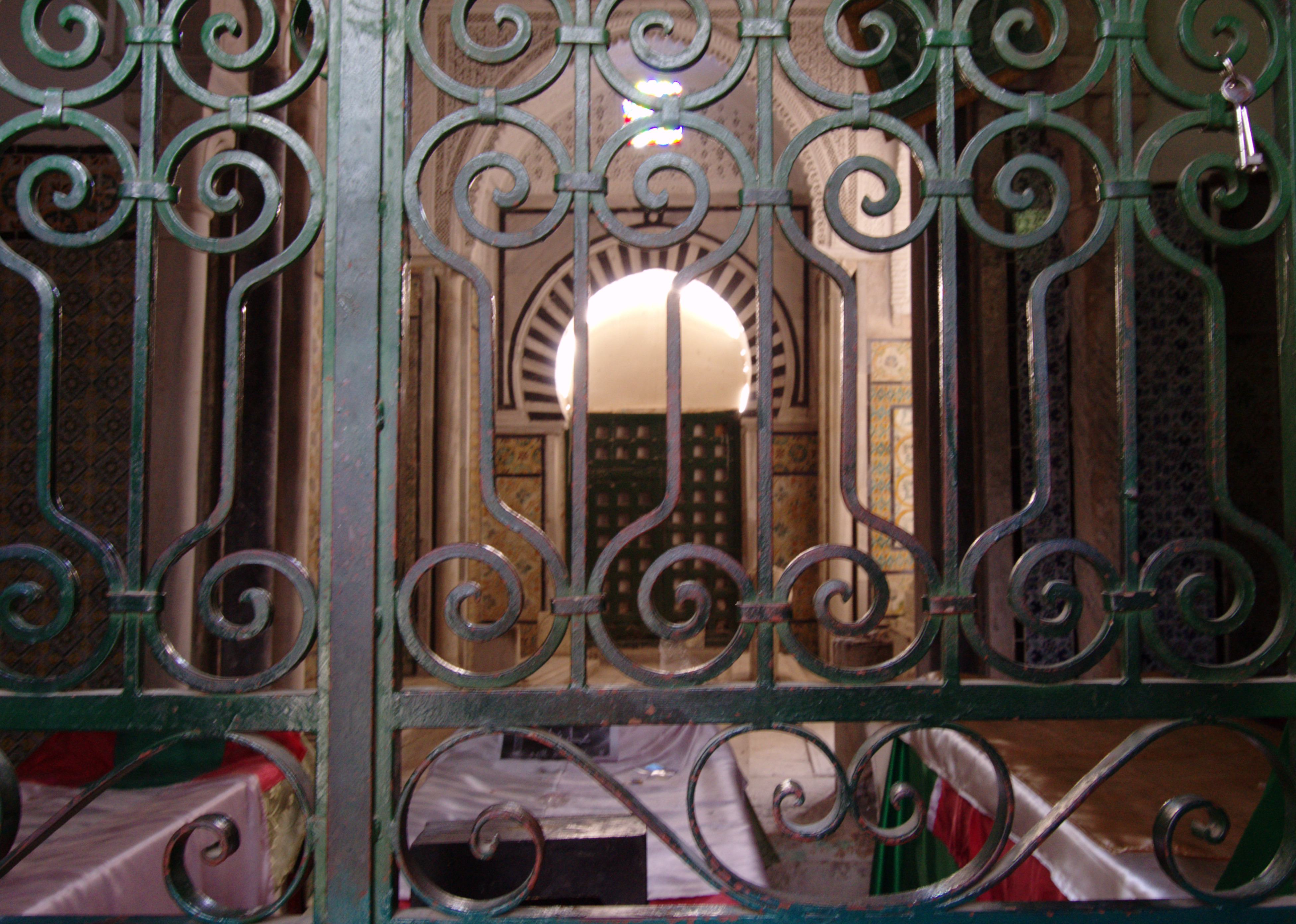 Zaouïa de Sidi ben Arous, Tunis